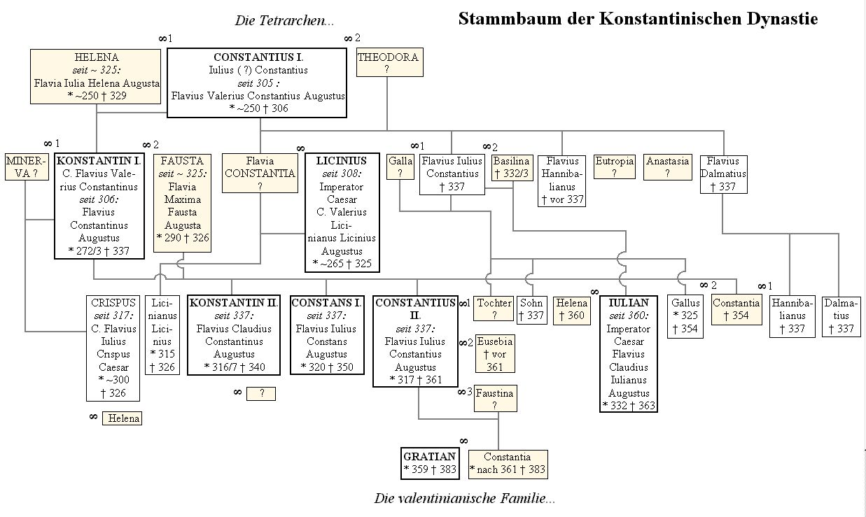 Stammbaum der konstantinischen Dynastie.